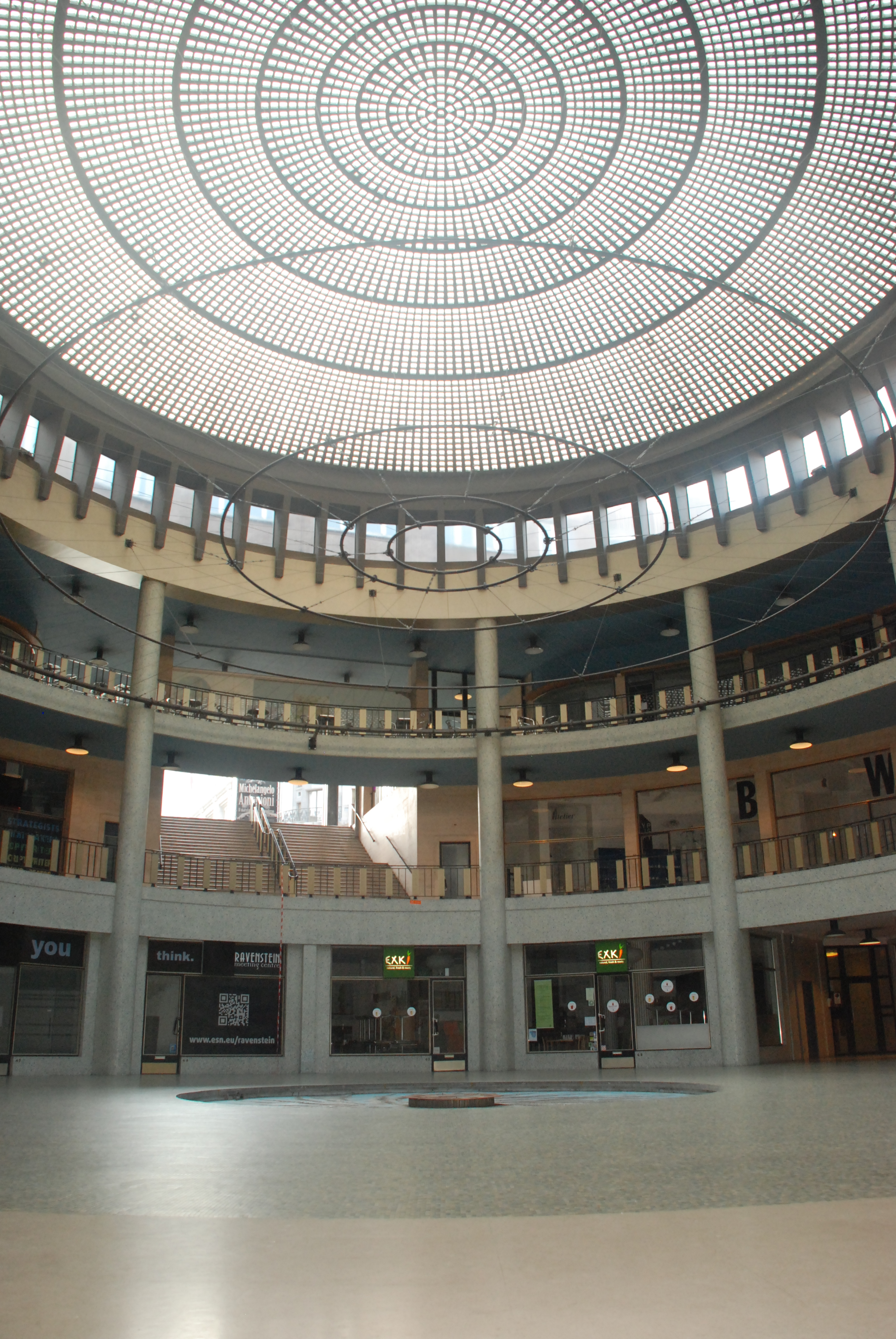 Belgique - Bruxelles - Galerie Ravenstein - Architecture monumentale - architectes Alexis et Philippe Dumont - 1954-1958